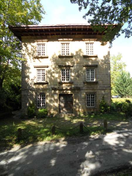 Urdanibia jauregia, Irun.